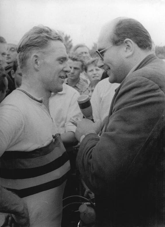 Zentralbild Schmidt 17.7.1960 Täve Schur gewann zum 4. Male die Harzrundfahrt Weltmeister Gustav-Adolf Schur gewann am 17.7.1960 zum 4. Male die Harzrundfahrt überlegen gegen die gesamte Spitzenklasse der DDR und einen Teil der italienischen Weltmeisterschaftsauswahl. Den 2. Platz erkämpfte sich Erich Hagen vor dem Italiener De Rosso. UBz: Gustav-Adolf Schur (links) wird von Heinz-Florian Oertel nach seinem Sieg interviewt.